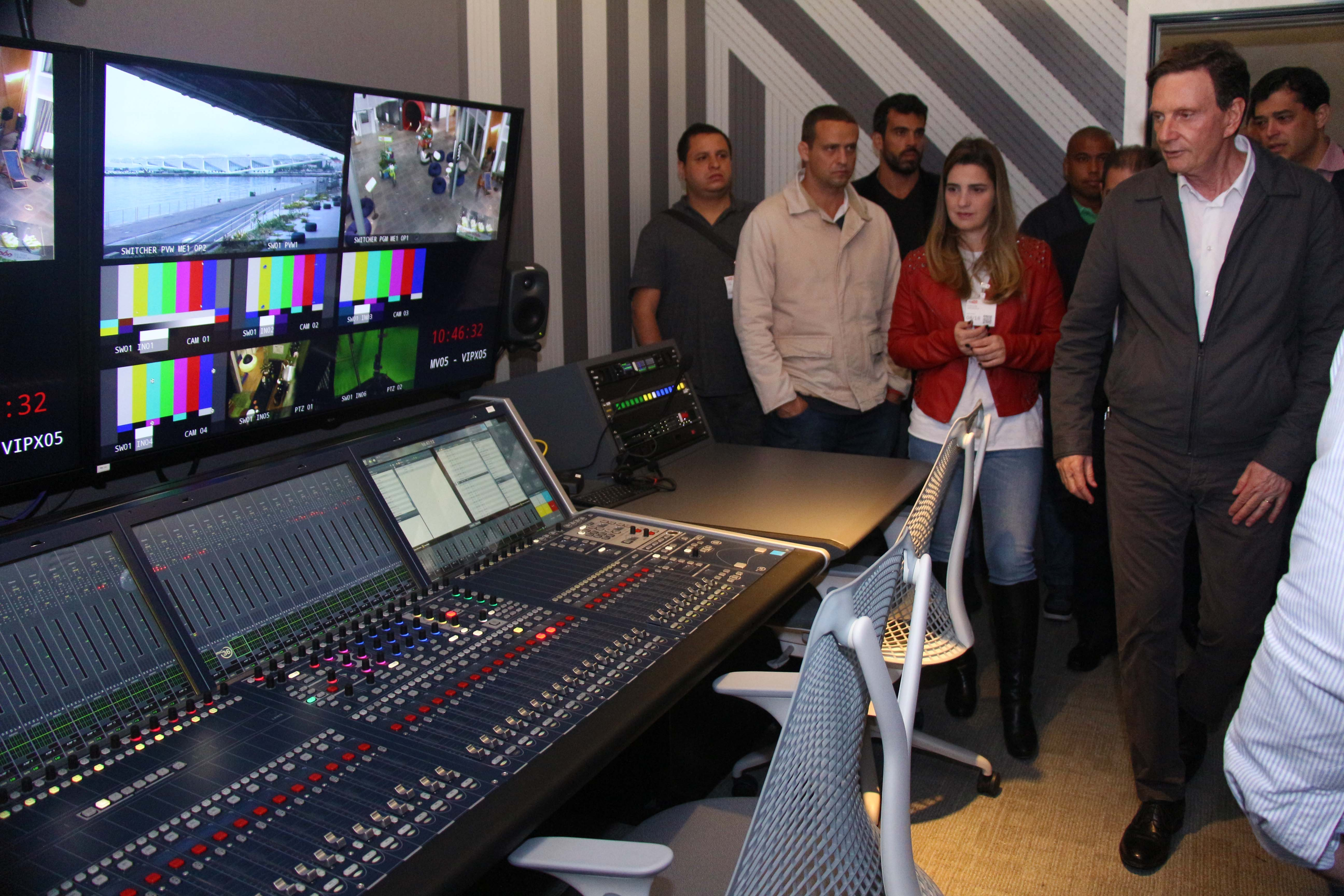 Prefeito Marcelo Crivella, do Rio de Janeiro, durante visita ao YouTube Space Rio.